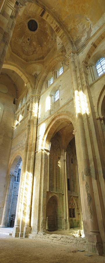 L'interno dell'abbazia di Cluny nel 2005 fonte